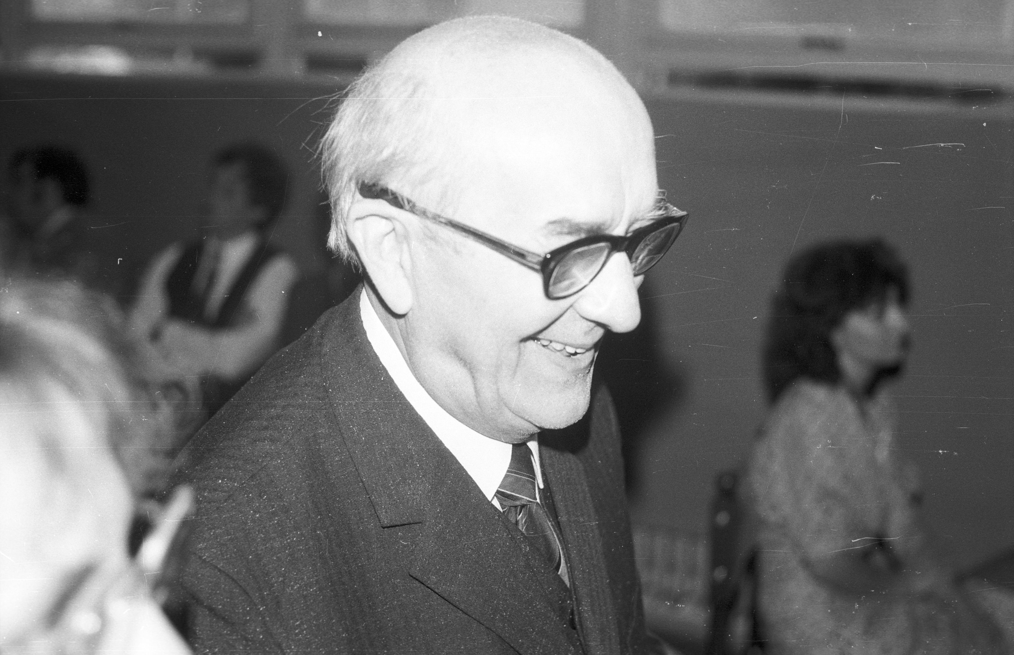 Pater Karel Dománek na svatbě 2.9.1989